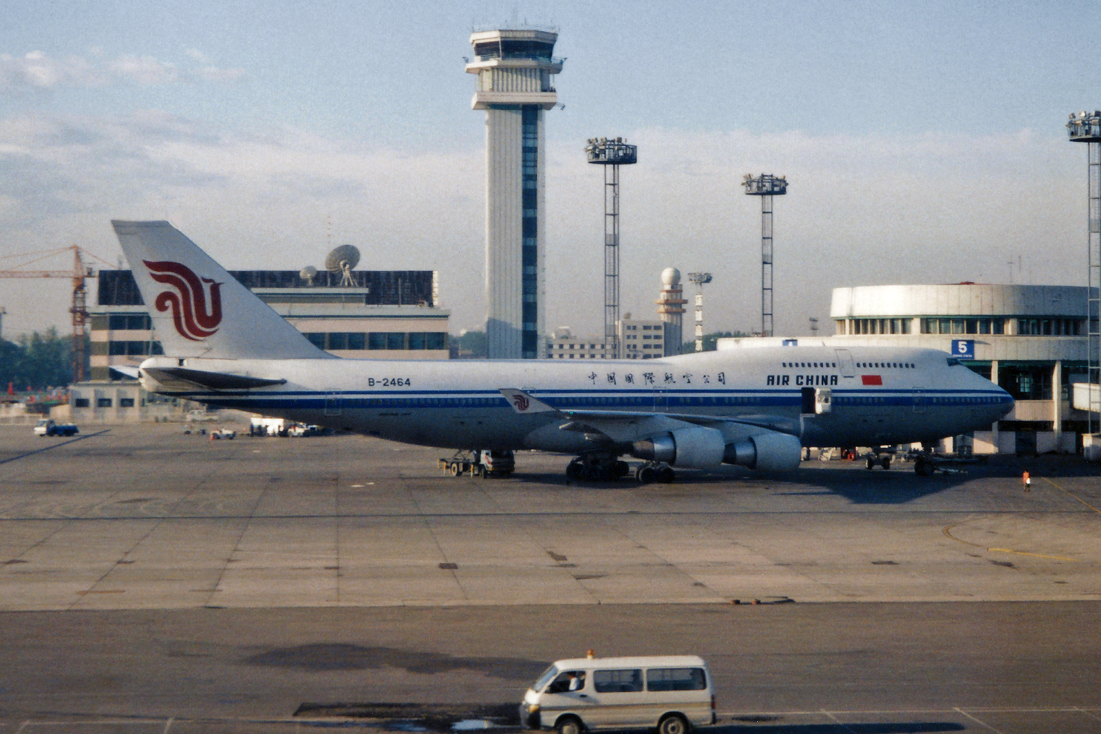 Beijing - Capital (PEK / ZBAA) China, 6.1997